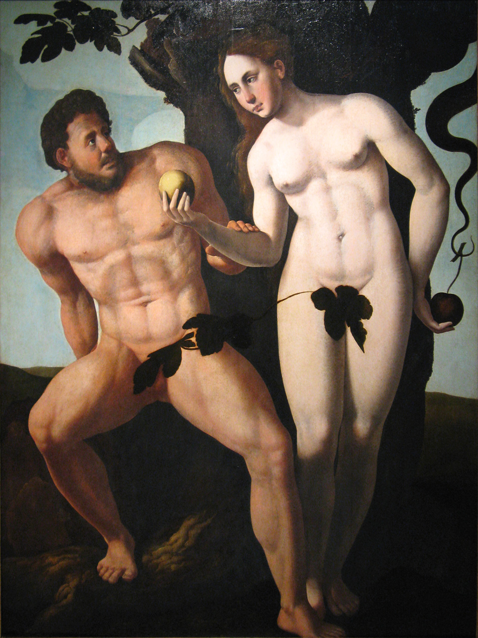 Jan van Scorel – Adam en Eva Jan van Scorel Schoorl 1495 - Utrecht 1562 Adam en Eva